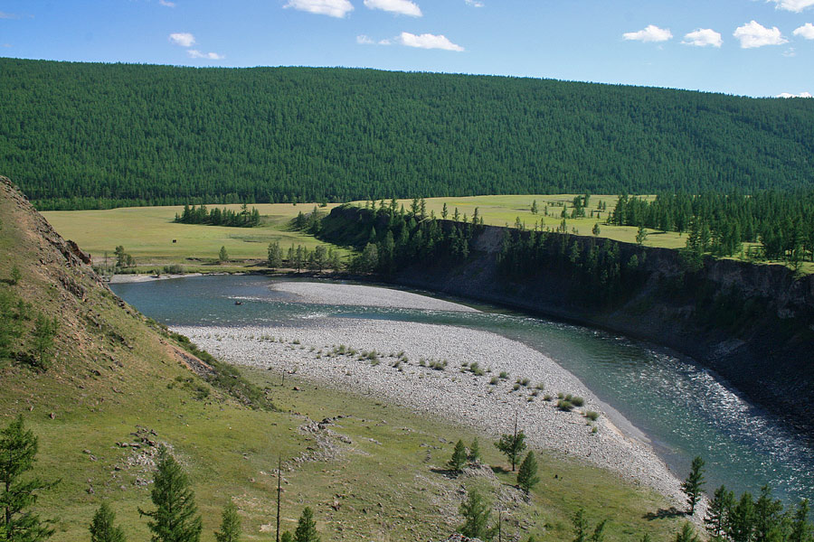 Ока Саянская перед устьем Жомболока